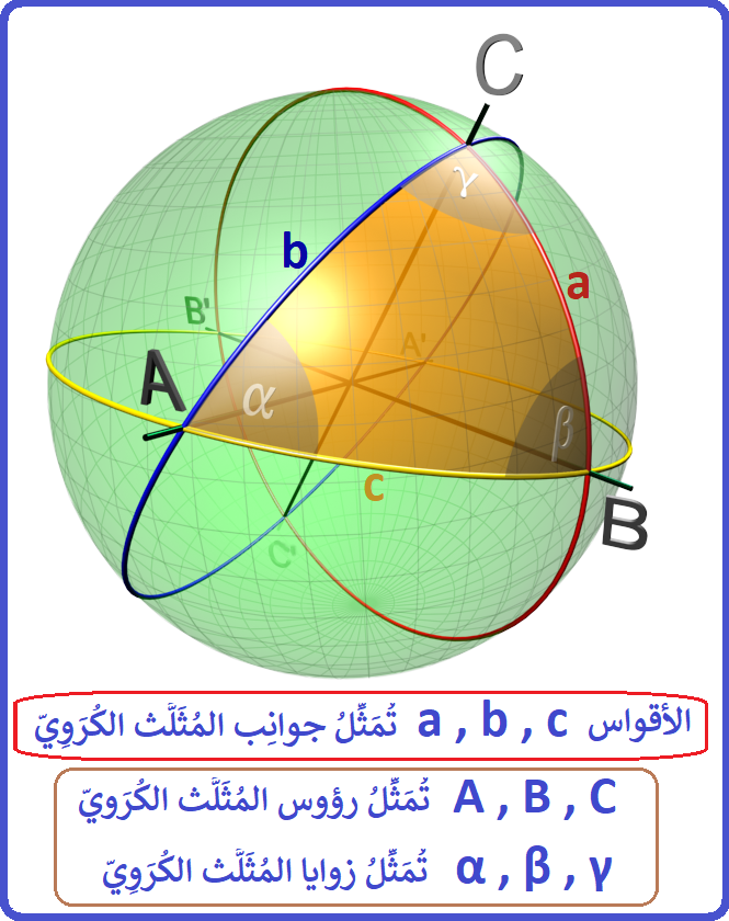 وصف عناصر المُثَلَّث الكُرَويّ الجوانِب والزوايا والرؤوس